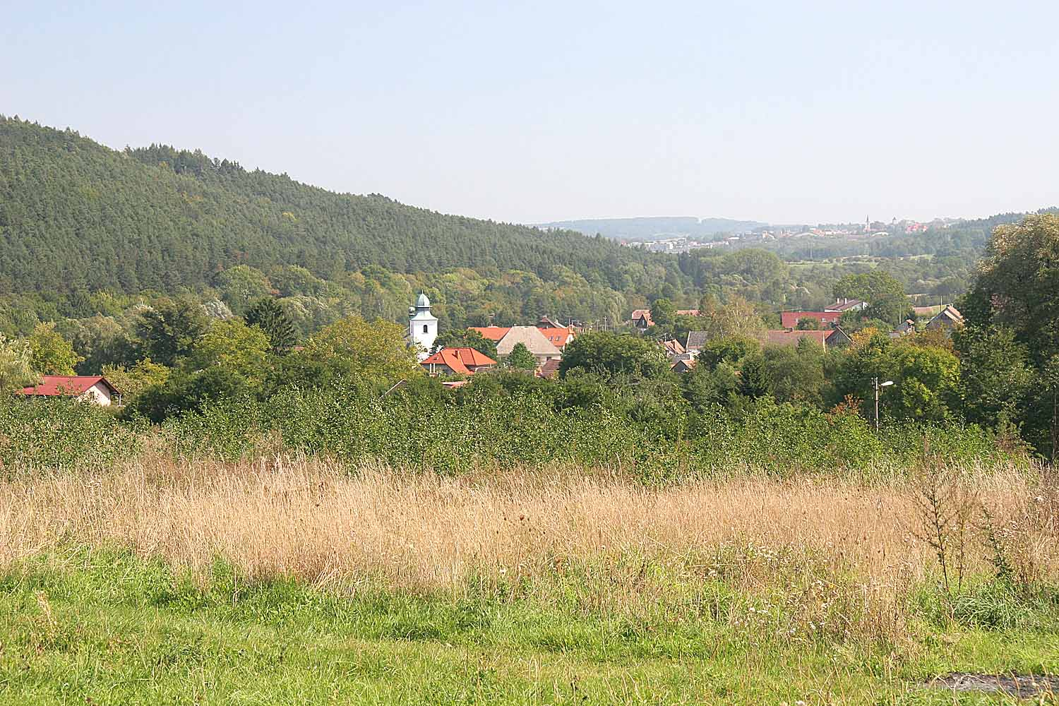 Pohled na Vrbatův Kostelec ze silnice do osady Hlína, Chrudim district, Czech Republic autor: Prazak Date: 14. 9. 2006